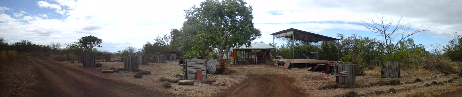 Un lieu sommairement aménagé : de la terre rouge, des benjoins-pays . Une faune et flore typique des Hauts de l'Ouest de La Réunion.